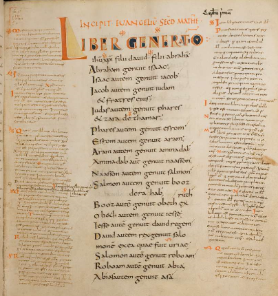 Glossae in Mattheum